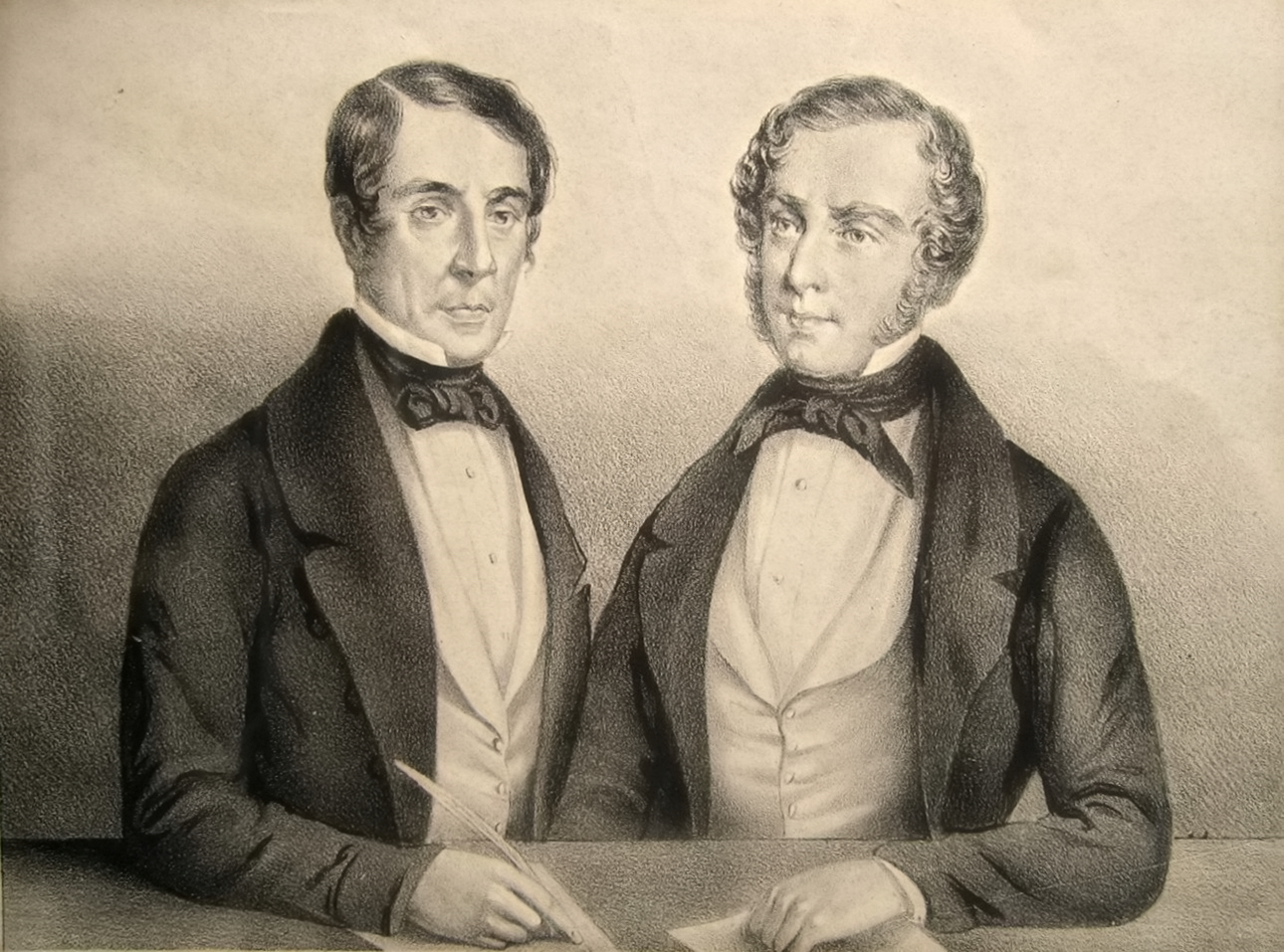 Lord Cowley, Lord Clarendon. K. Großbrittanische Bevollmächtigte.